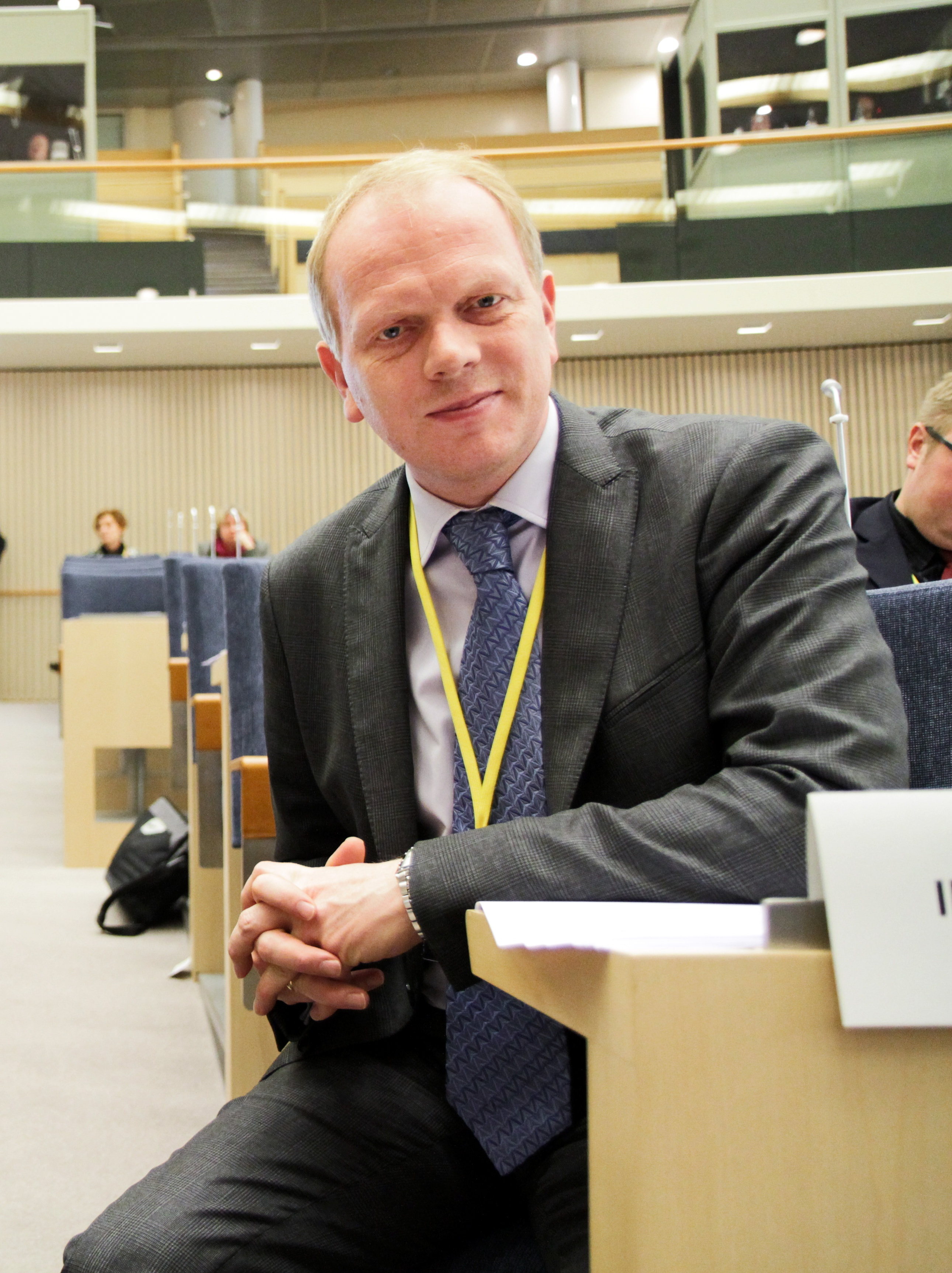 Nordiska rådets vice president Illugi Gunnarsson. Nordiska rådets session i Stockholm 2009.